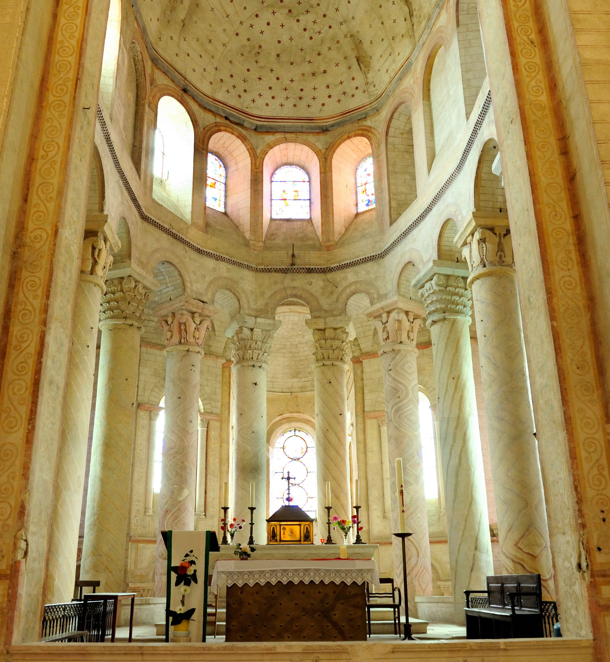 Voir compartimentation sur schéma .